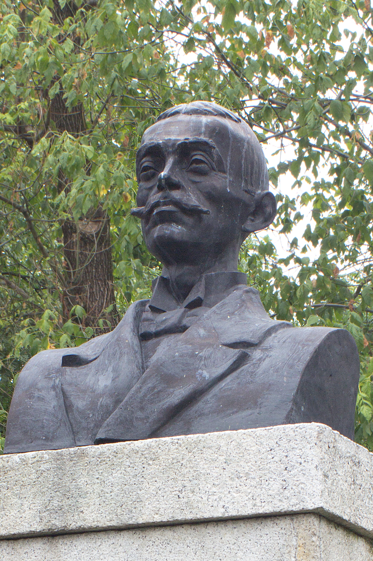 Büste von Dr. Petru Pipos (Prof. für Pädagogik - 1859-1913) in Arad (Rumänien).